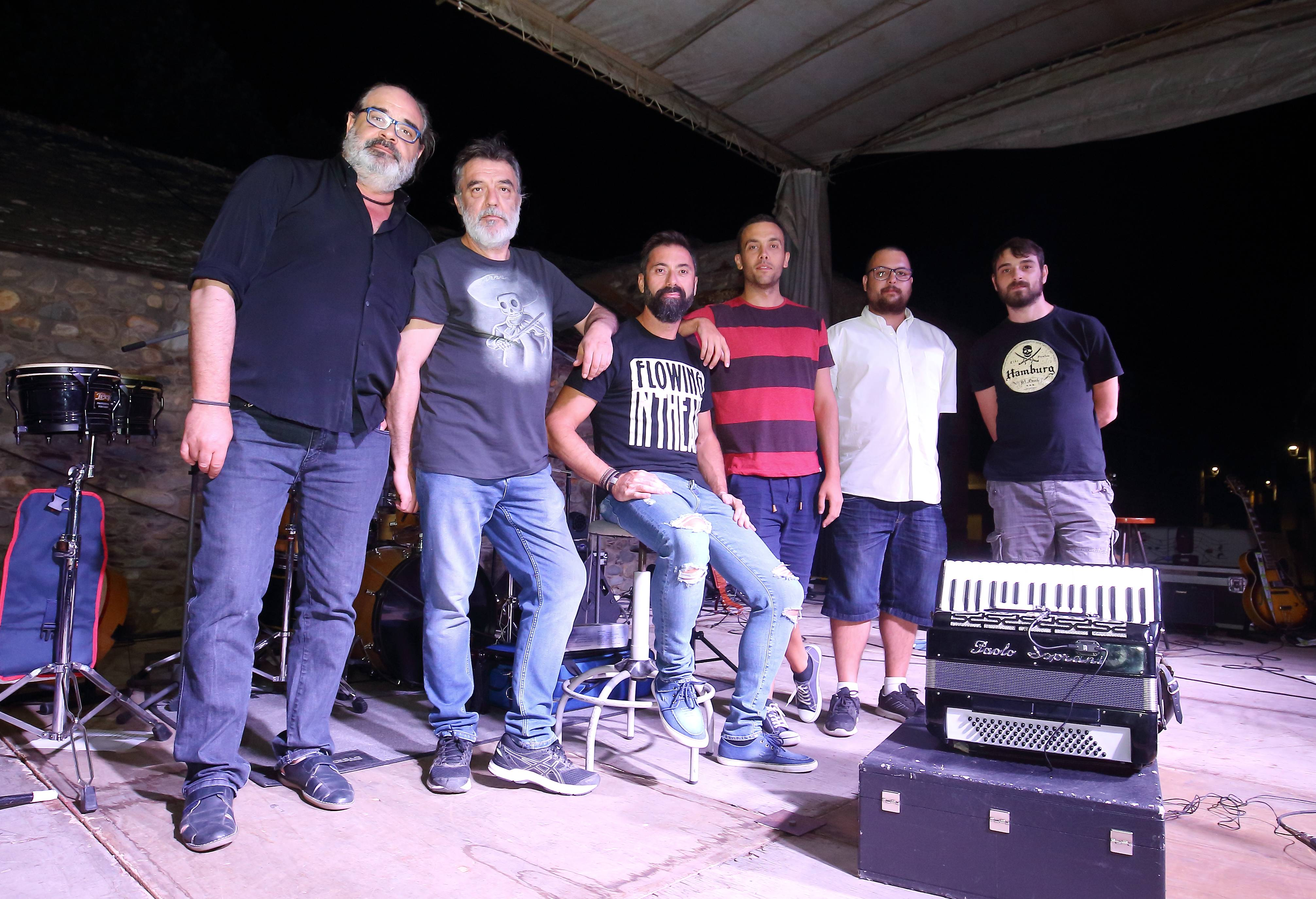 Grupo de música folk Rapabestas